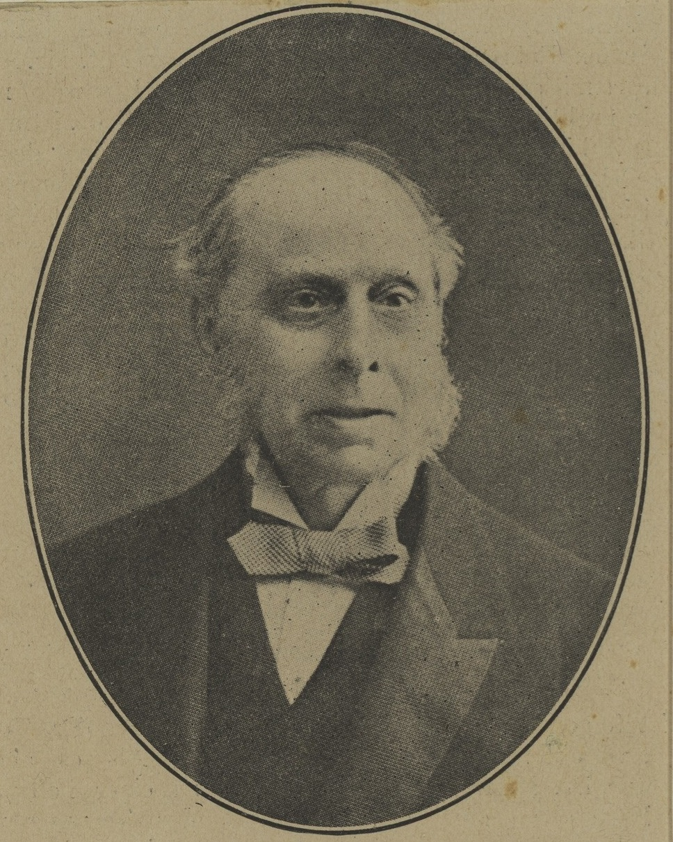 David Lindo Alexander